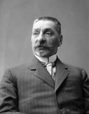 Анатолий Николаевич Крупенский, русский дипломат, посол в Италии.